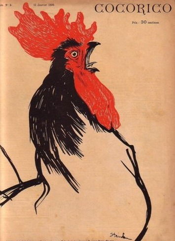 Cocorico n° 2 du 15 janvier 1899, couverture de Théophile Alexandre Steinlen.